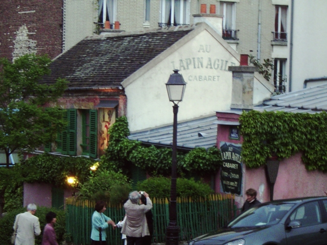 Au Lapin Agile in Paris's Montmartre district.